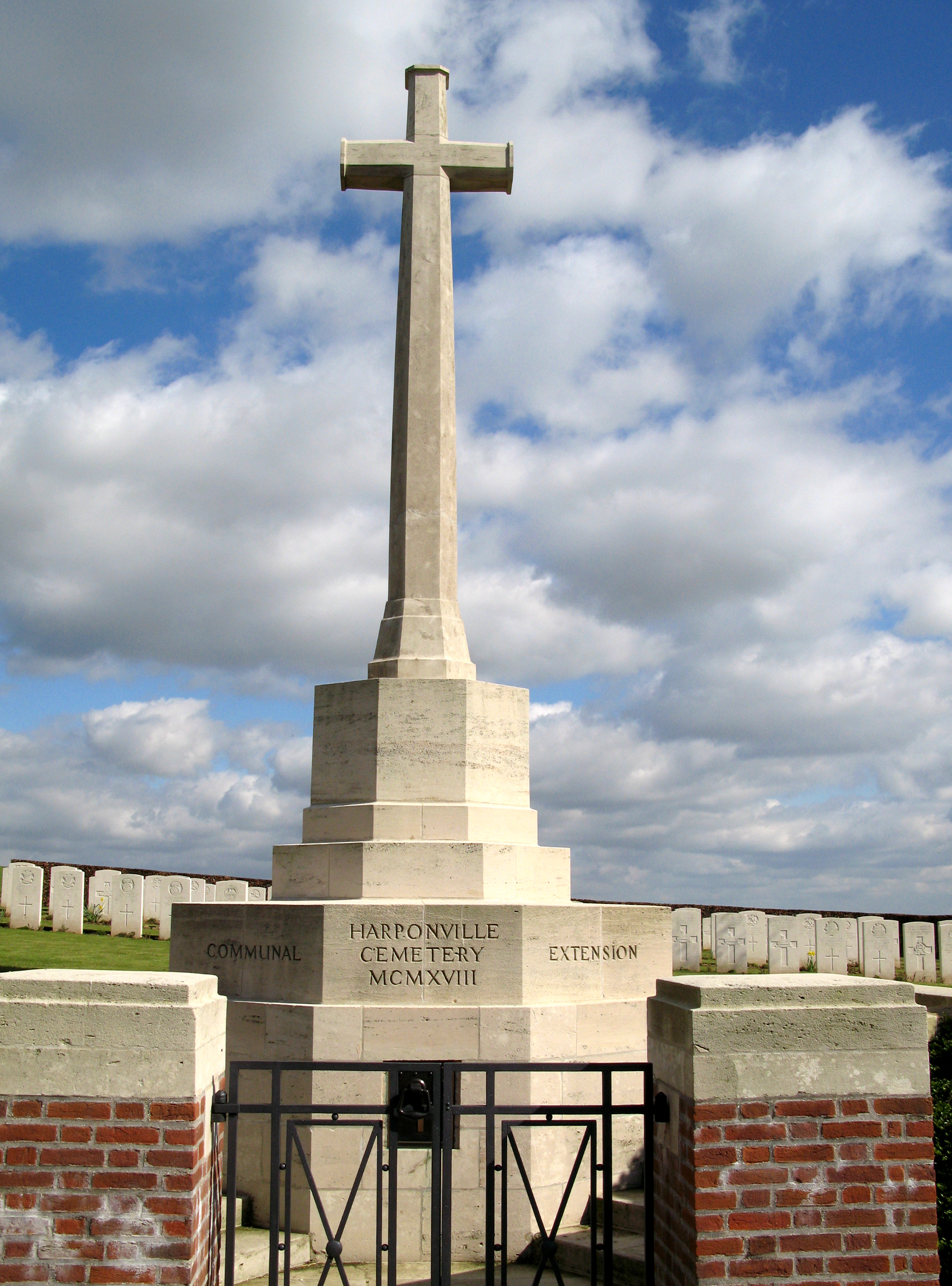 Harponville (Somme, France) - La croix du cimetière militaire.